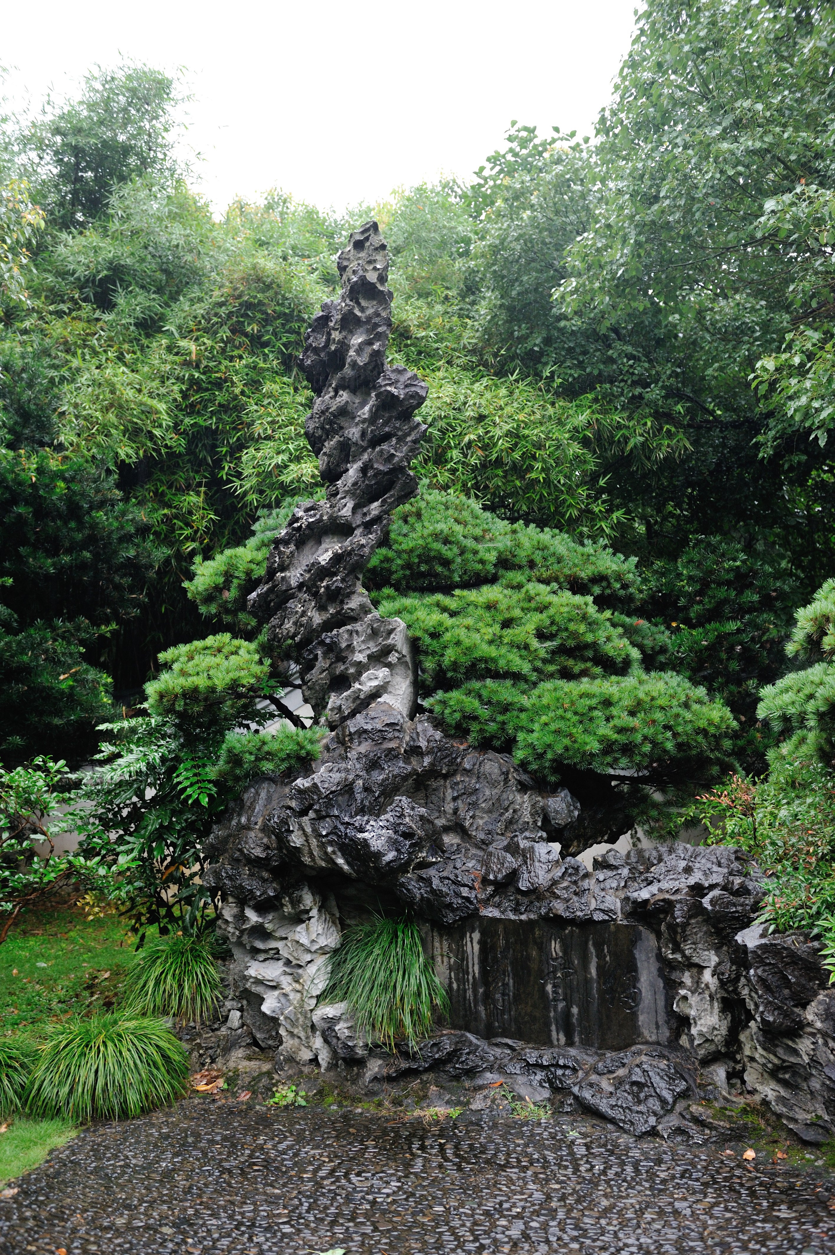 绉云峰 - 杭州竹素园